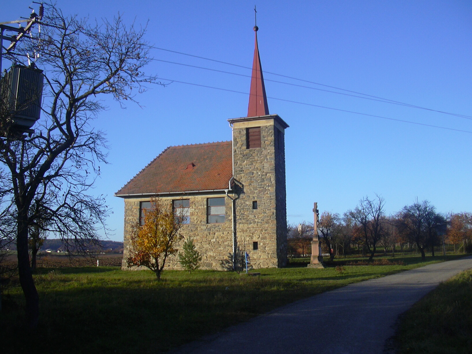 Kamenná kaple v Pařezovicích (Vyškov- Czech republic)